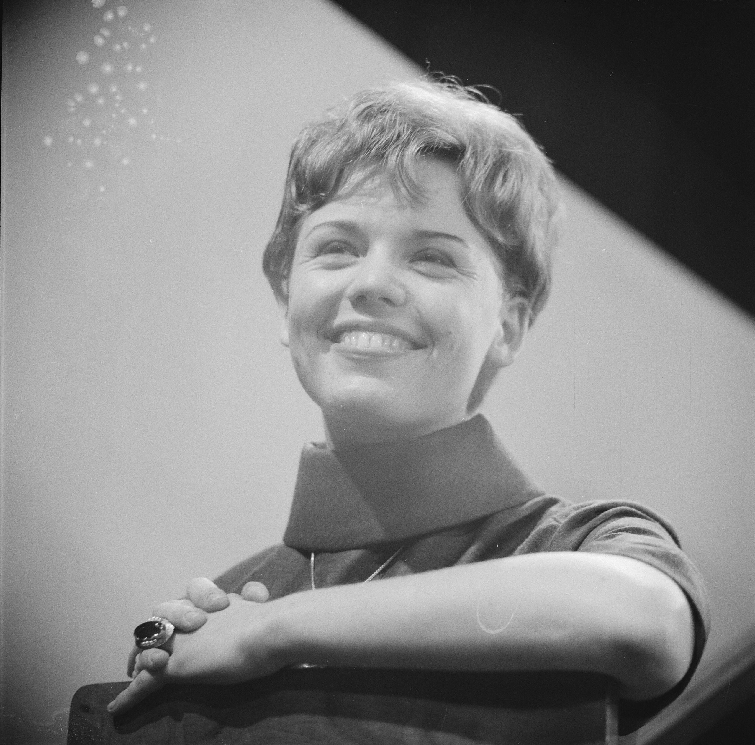 Collectie / Archief : Fotocollectie Anefo Reportage / Serie : Eurovisie Songfestival 1961 Beschrijving : Greetje Kauffeld zingt "Wat een dag" het Nederlandse liedje voor het Eurovisie Songfestival 1961 Datum : 15 februari 1961 Trefwoorden : artiesten, muziek, portretten, songfestivals Persoonsnaam : Kauffeld, Greetje Fotograaf : Nijs, Jac. de / Anefo Auteursrechthebbende : Nationaal Archief Materiaalsoort : Negatief (zwart/wit) Nummer archiefinventaris : bekijk toegang 2.24.01.03 Bestanddeelnummer : 912-1033